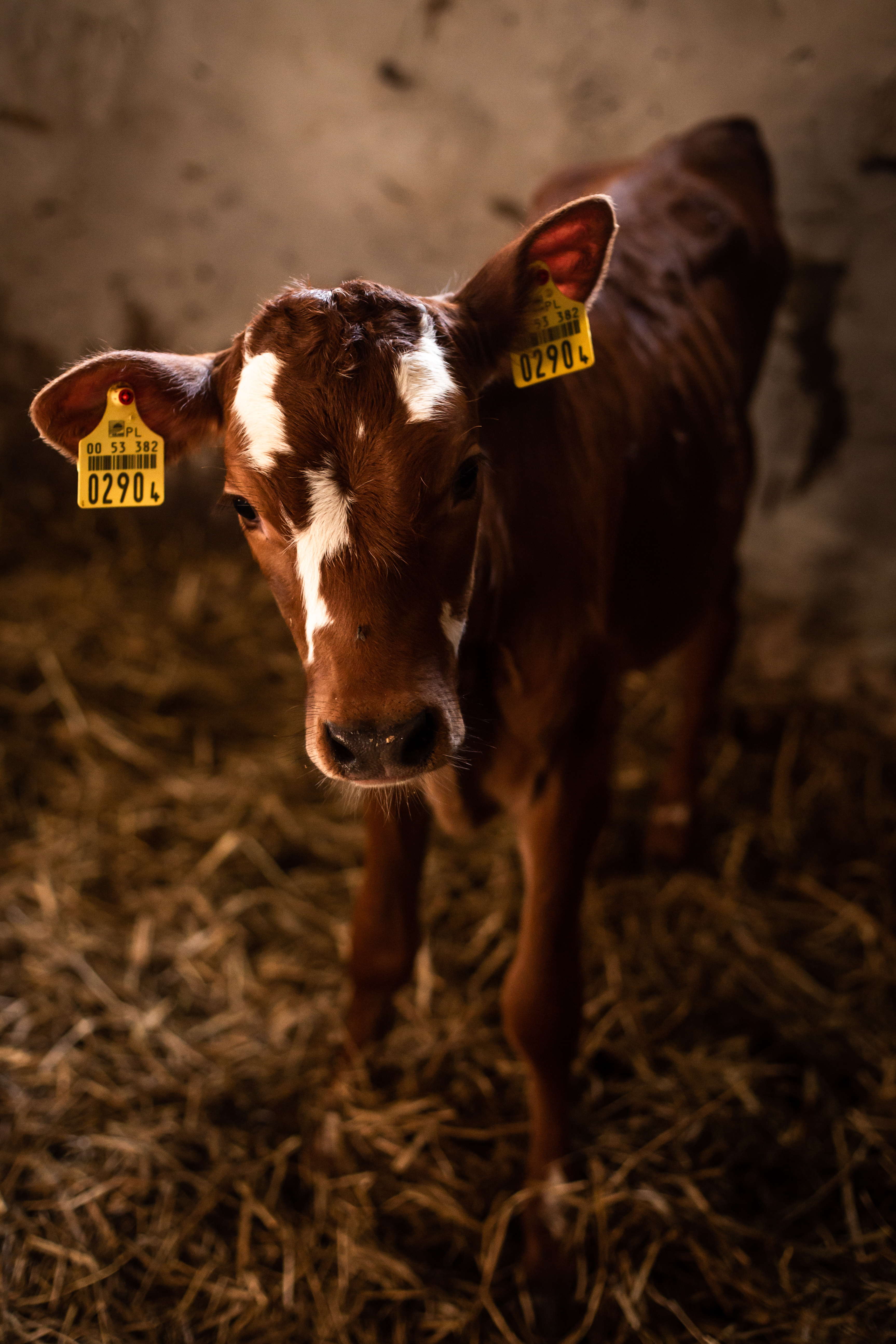 Konrad Łoziński